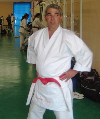 Il Maestro Giorgio Carcangiu, cintura nera 6° DAN, di Karate Shotokan.